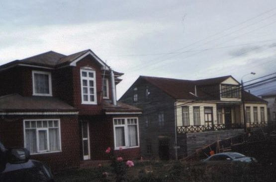 Plaza de Armas, Chonchi, Isla de Chiloé, Chile